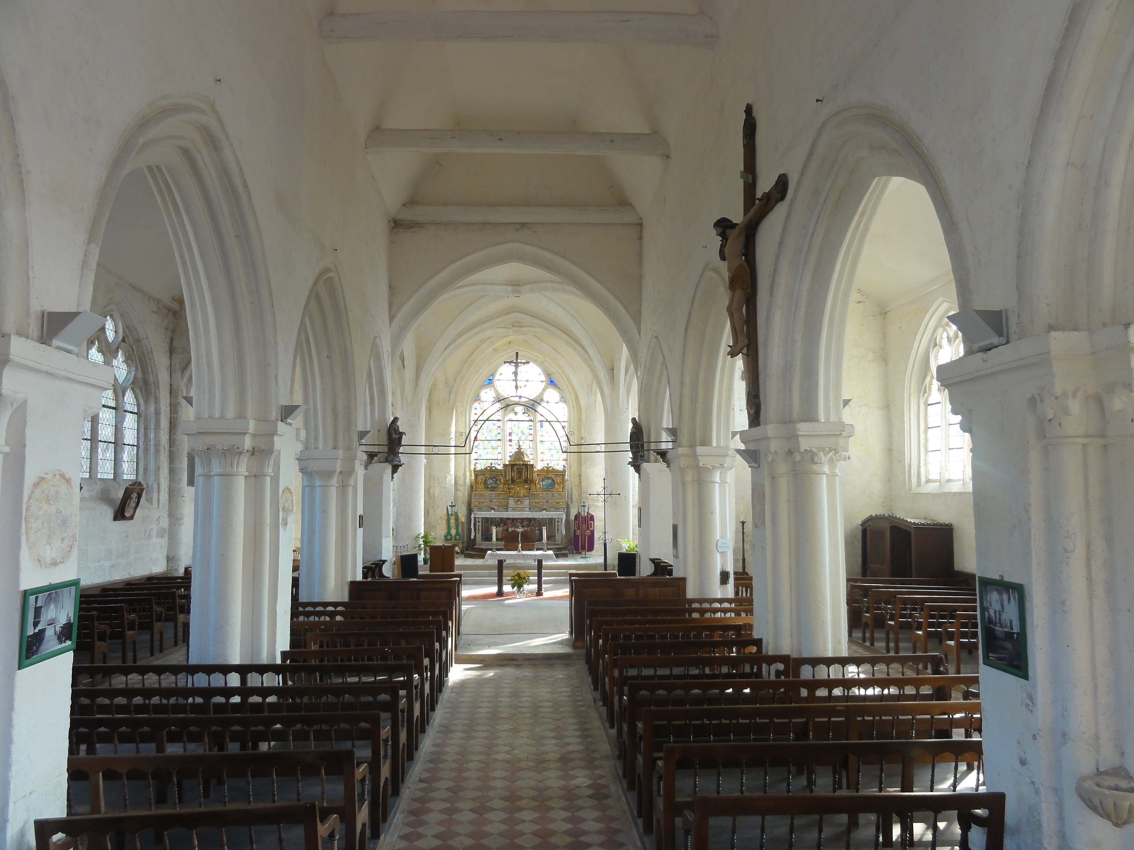 Intérieur de l'église - voir titre.